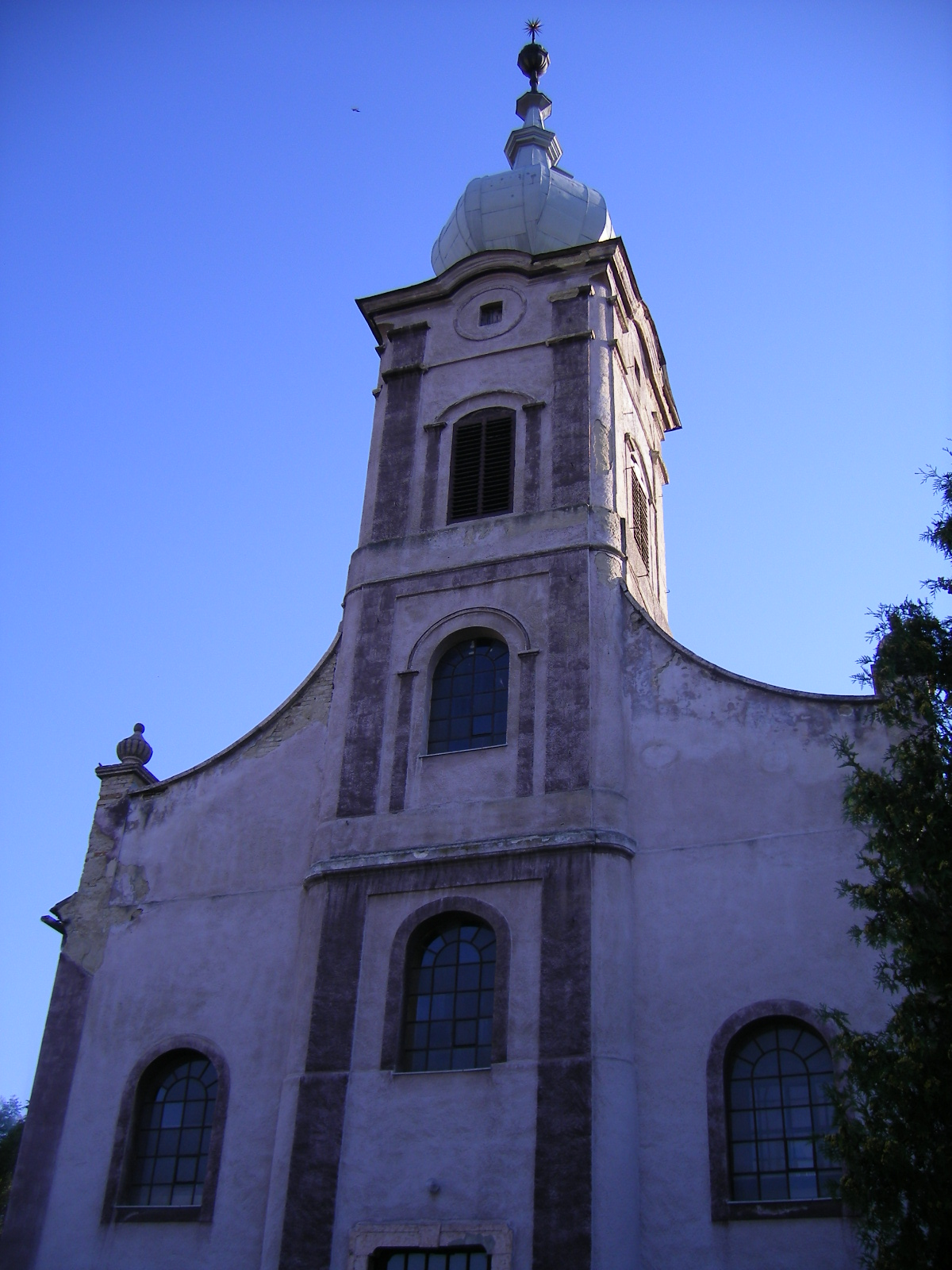 Nagyigmánd - református templom